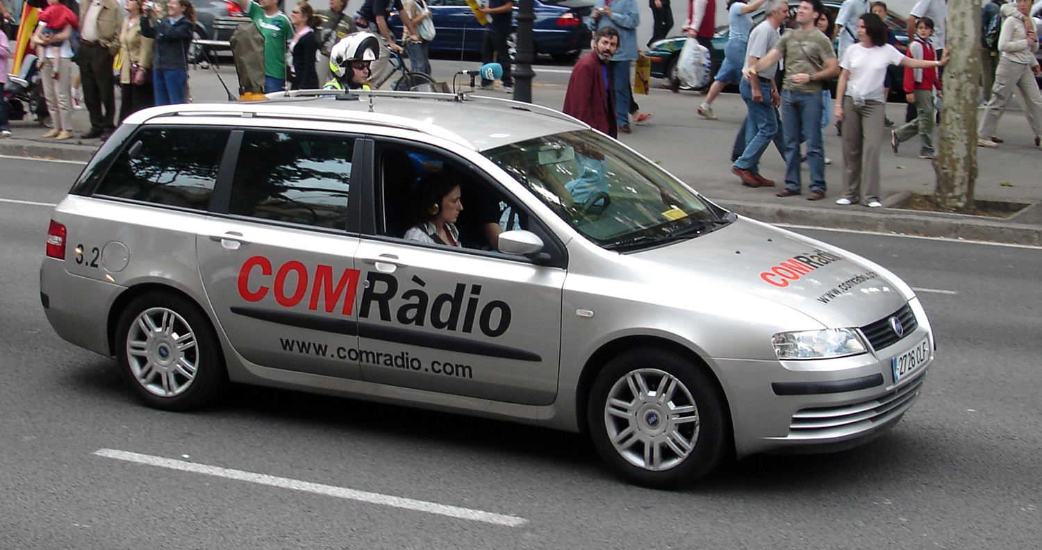 Unidad móvil oficial de "COM Ràdio" (Barcelona, 2005)